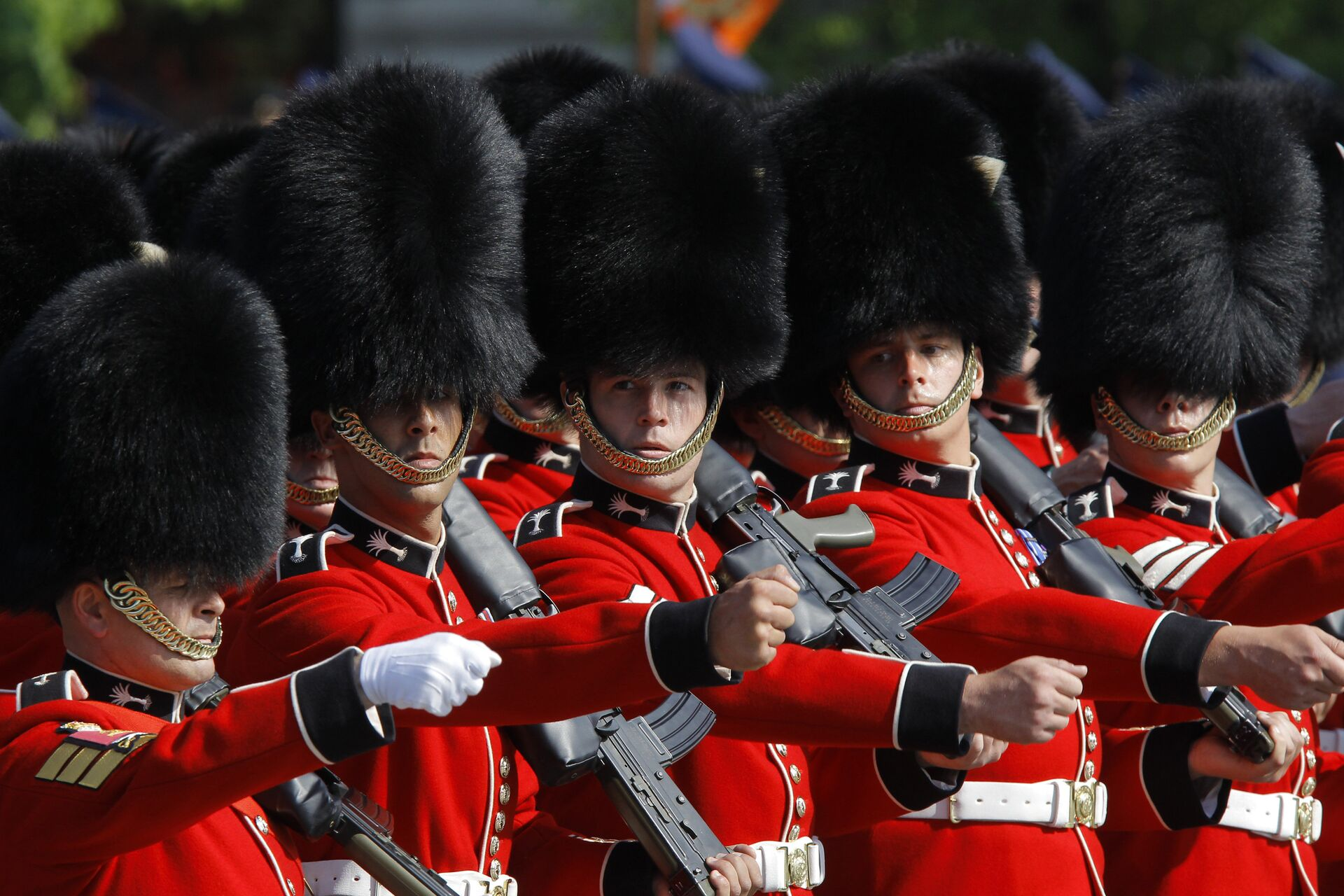 Военный парад, посвящённый 65-летию Победы в Великой Отечественной войне.